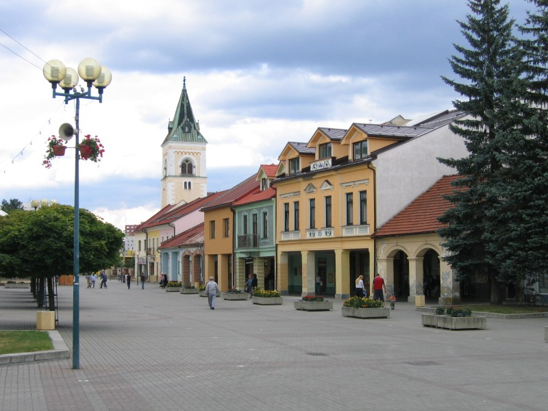 Kysucké Nové Mesto, námestie Slobody